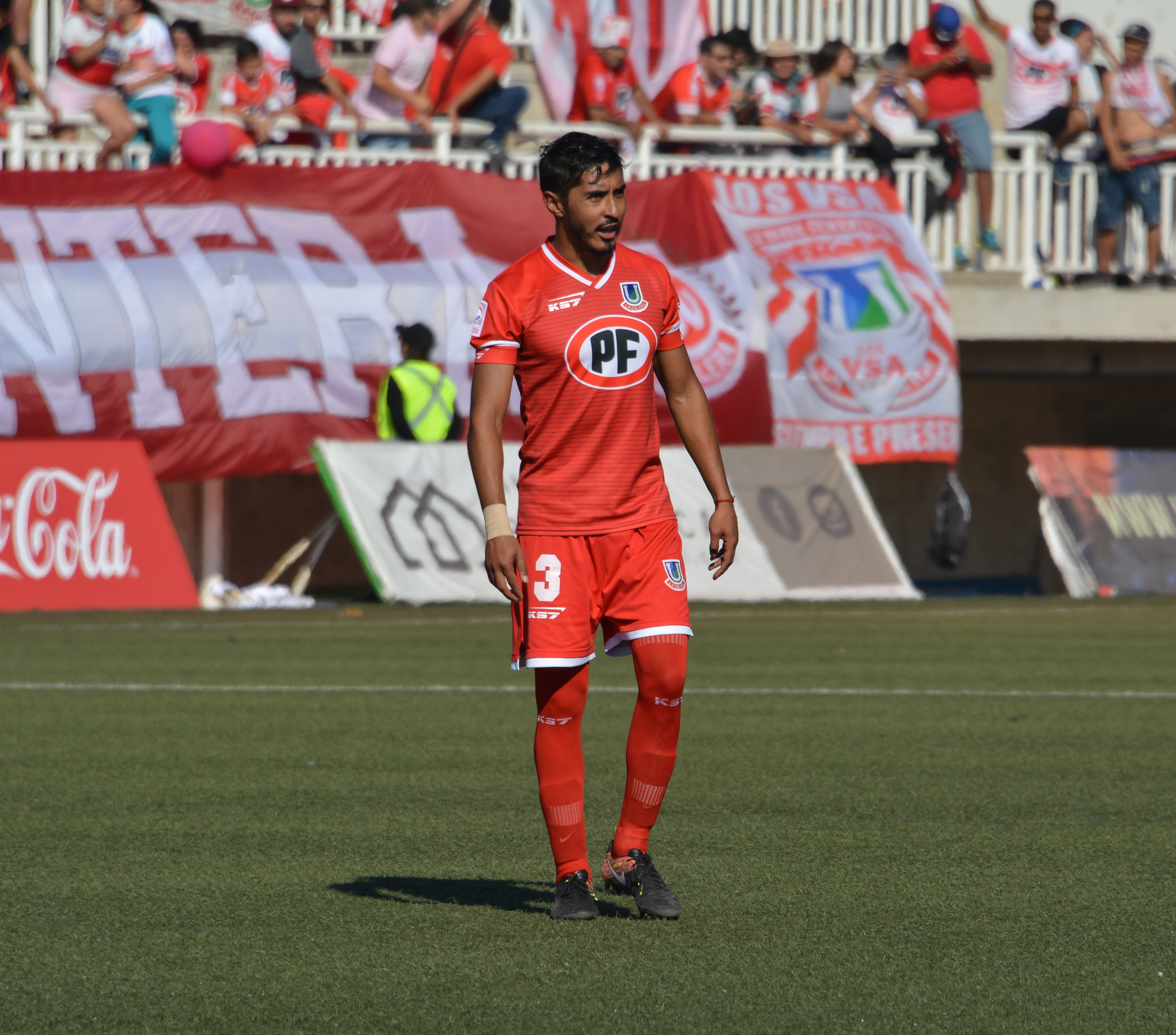 Unión La Calera v Universidad de Chile, Estadio Municipal Lucio Fariña Fernández, Quillota, Chile.